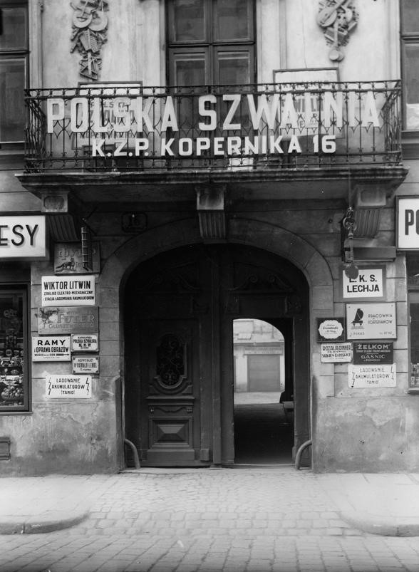 початок ХХ ст.